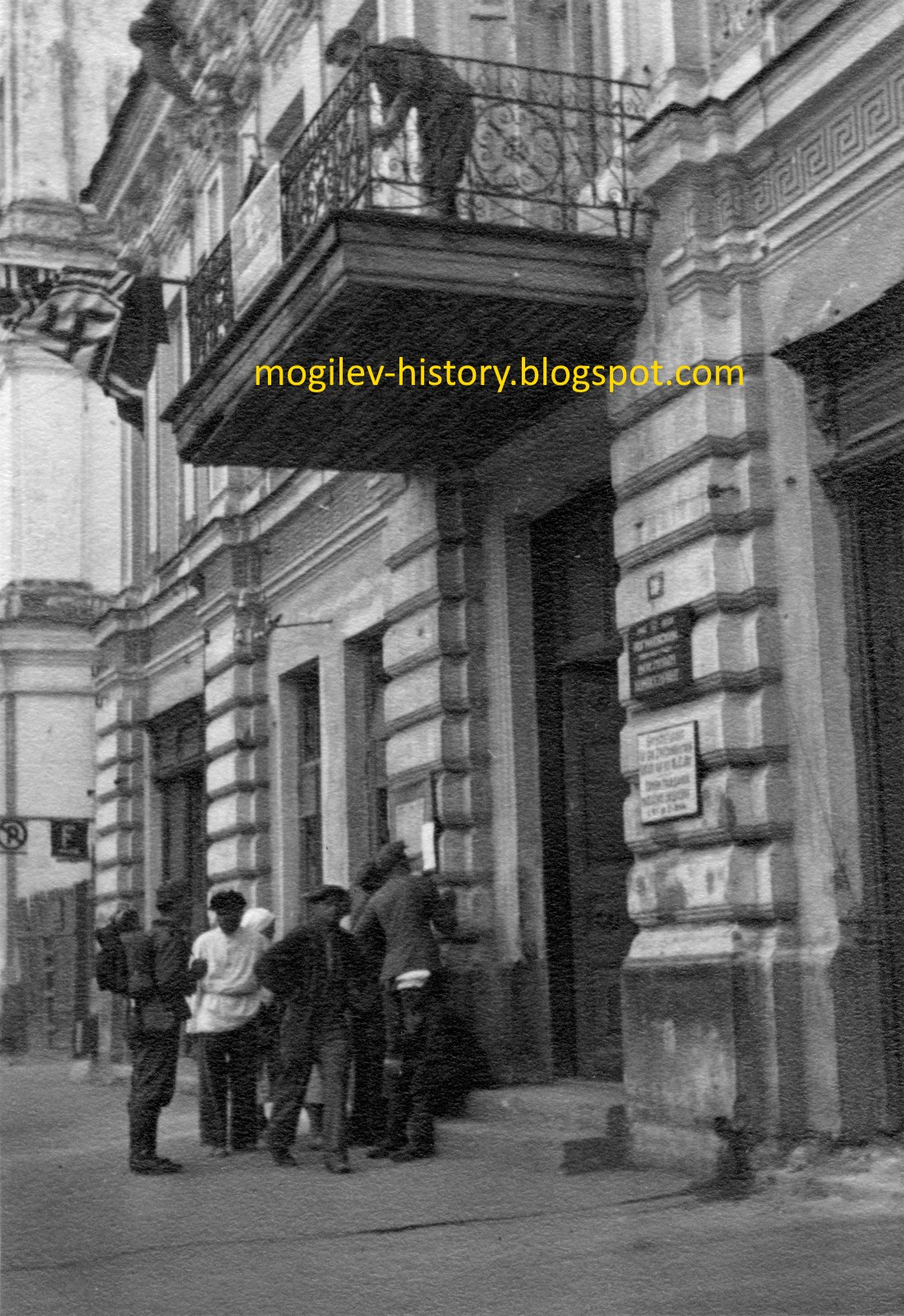 Беларуская (тарашкевіца): Магілёў (Mahiloŭ), пляц Тэатральны (plac Teatralny). Гатэль Францыя (Francyja)